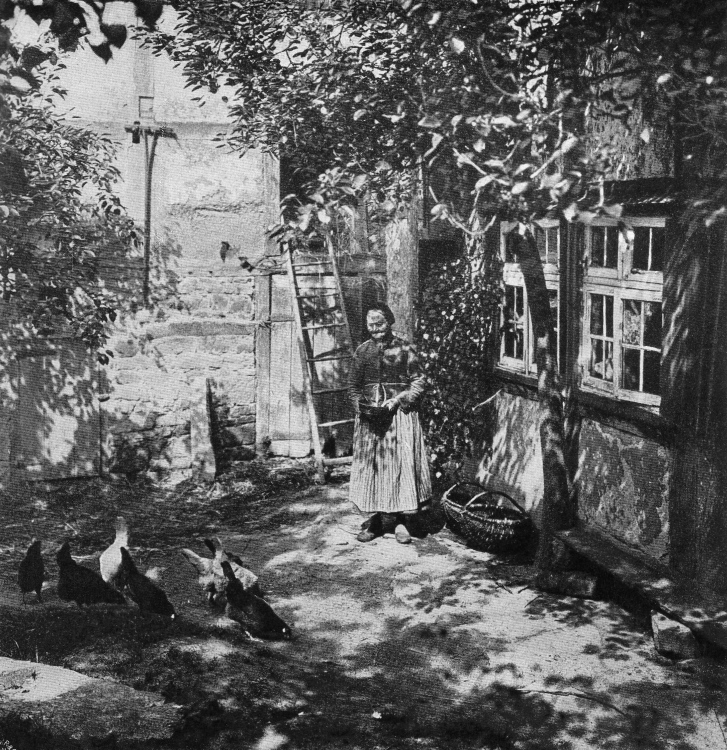 Originalbeschreibung „Motiv aus Exten bei Rinteln“. – Rinteln, Niedersachsen, Deutschland.